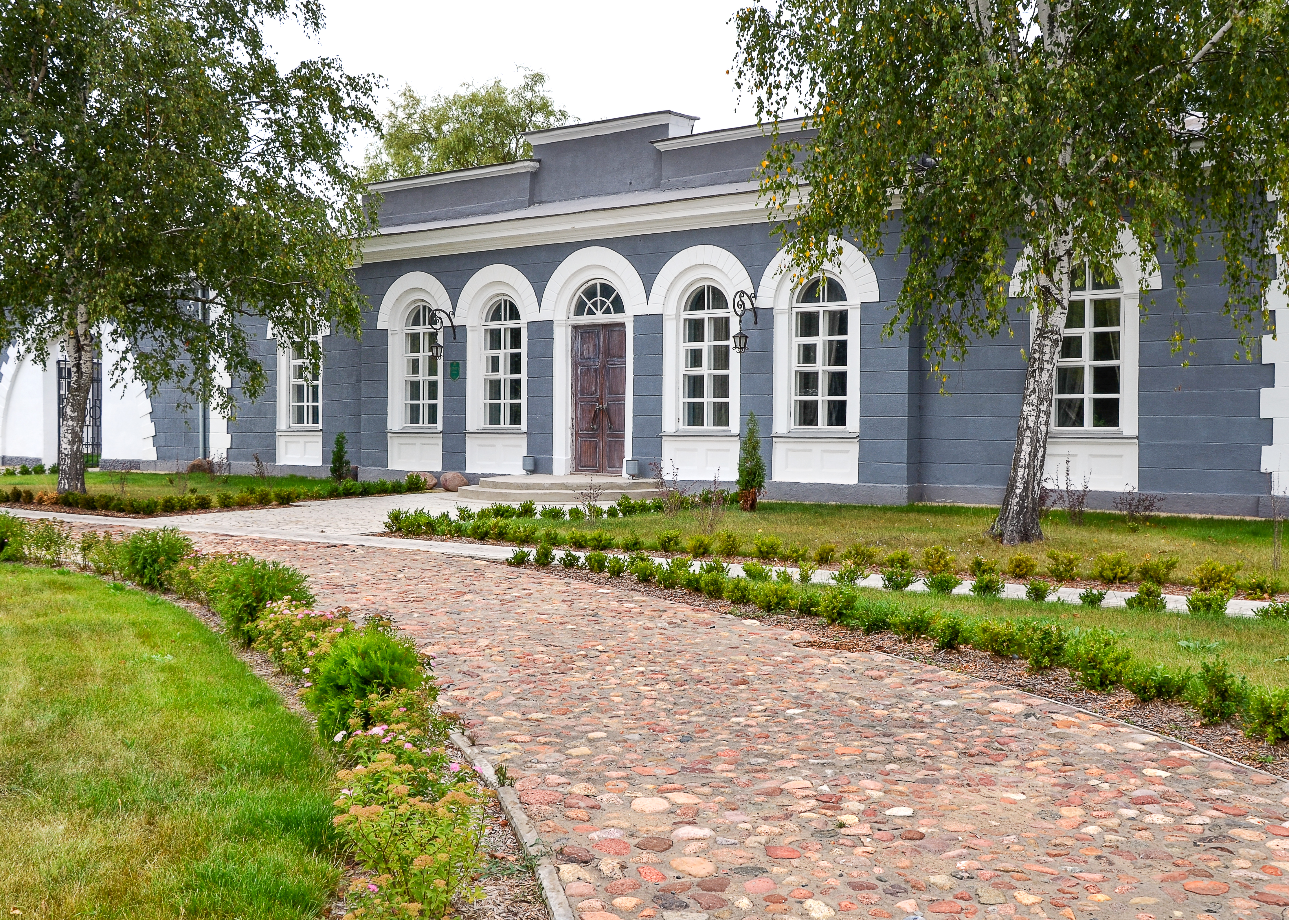 Фасад здания 2013 г.